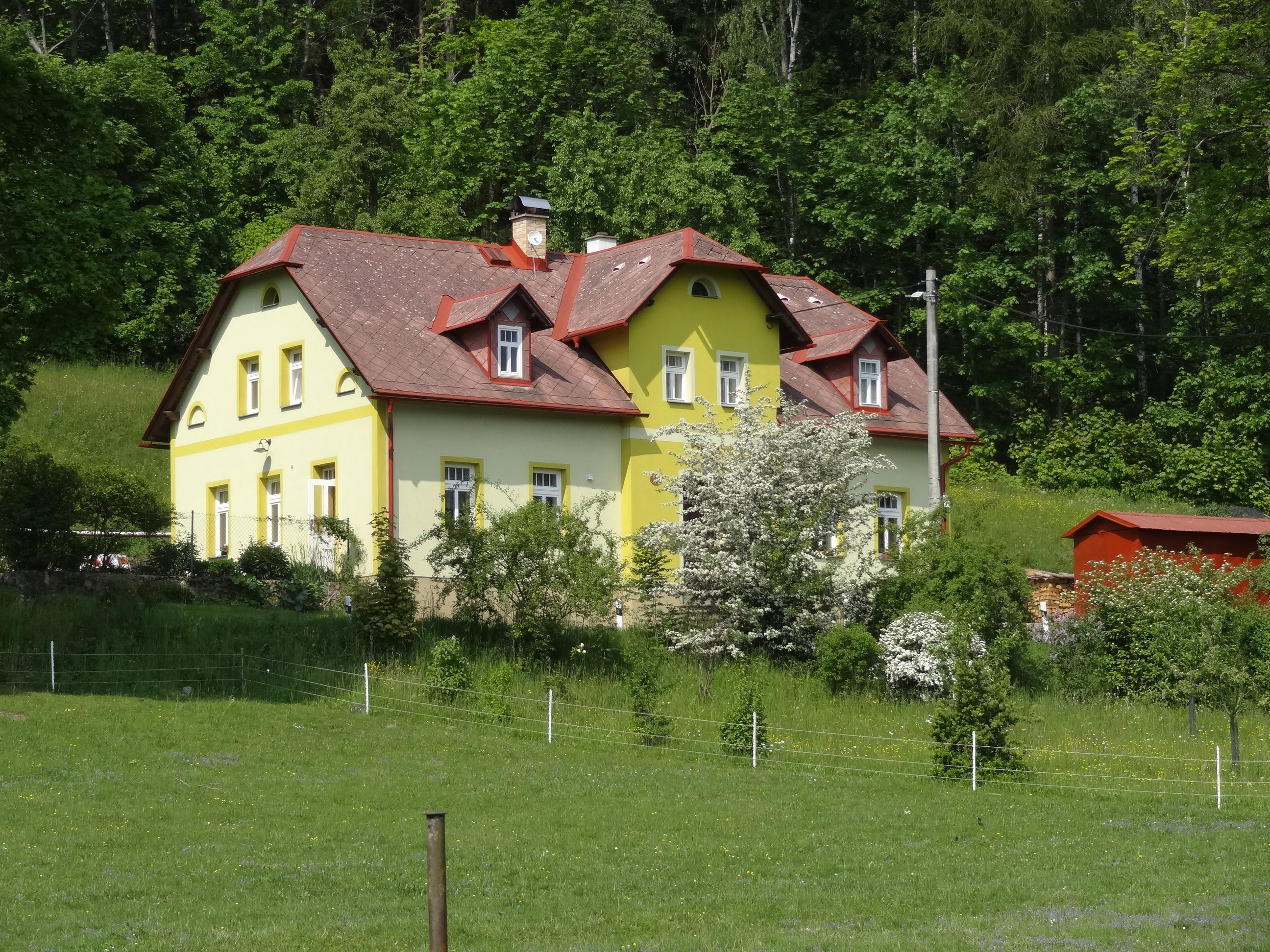 Horka (Proseč pod Ještědem) - čp. 6